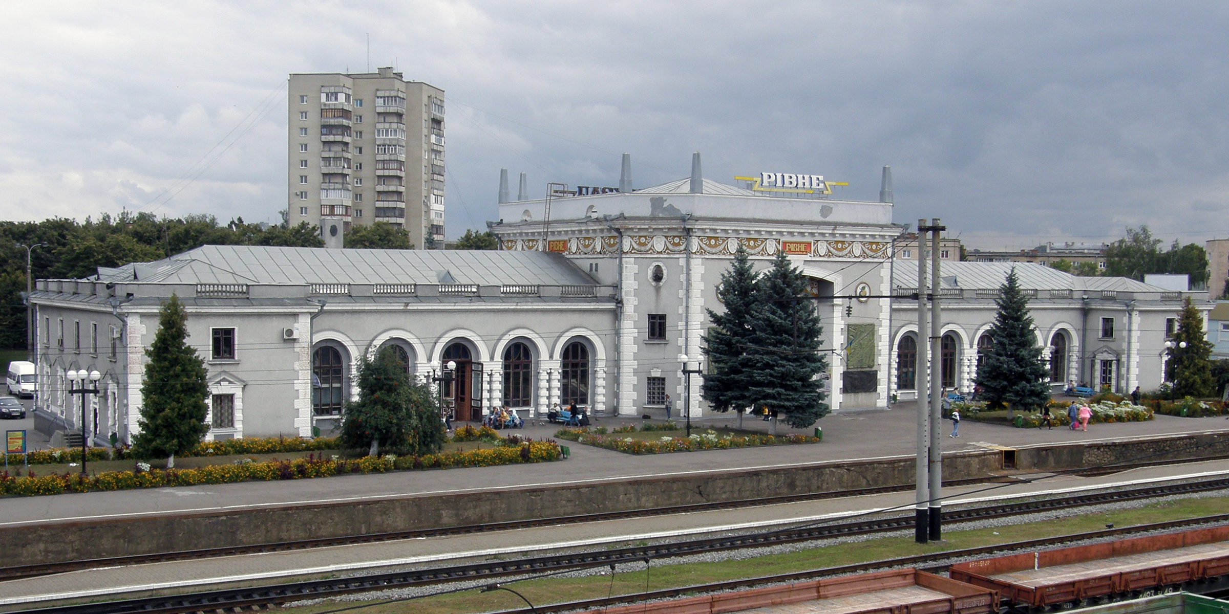 Вокзал, Рівне